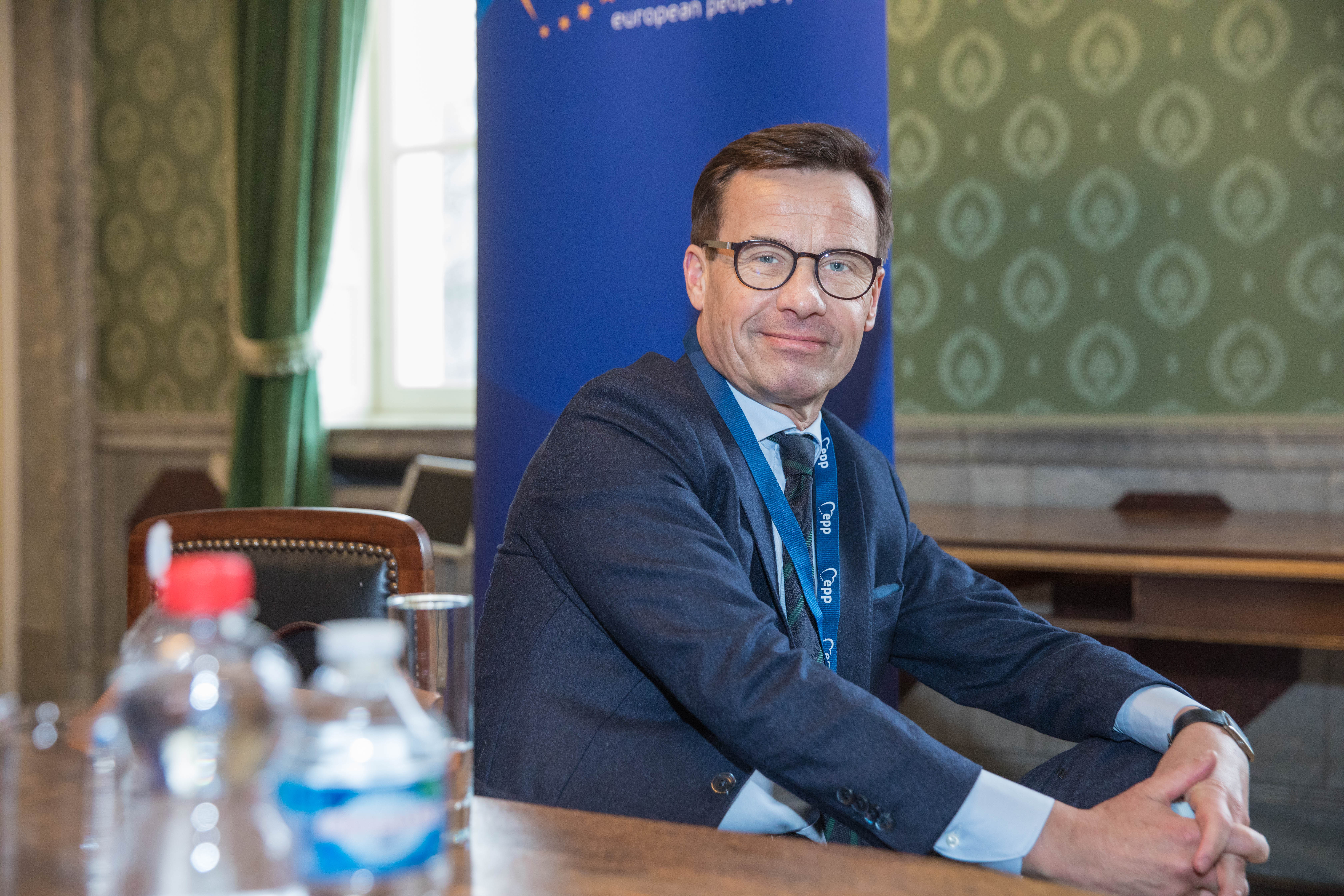 EPP Summit, 22 March 2018